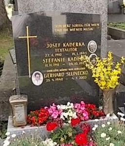 Josef Kaderka-Ottakringer Friedhof (MK-4-25)